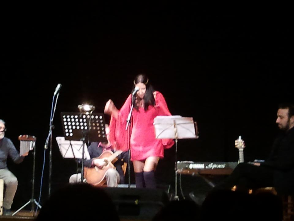 per Gaber